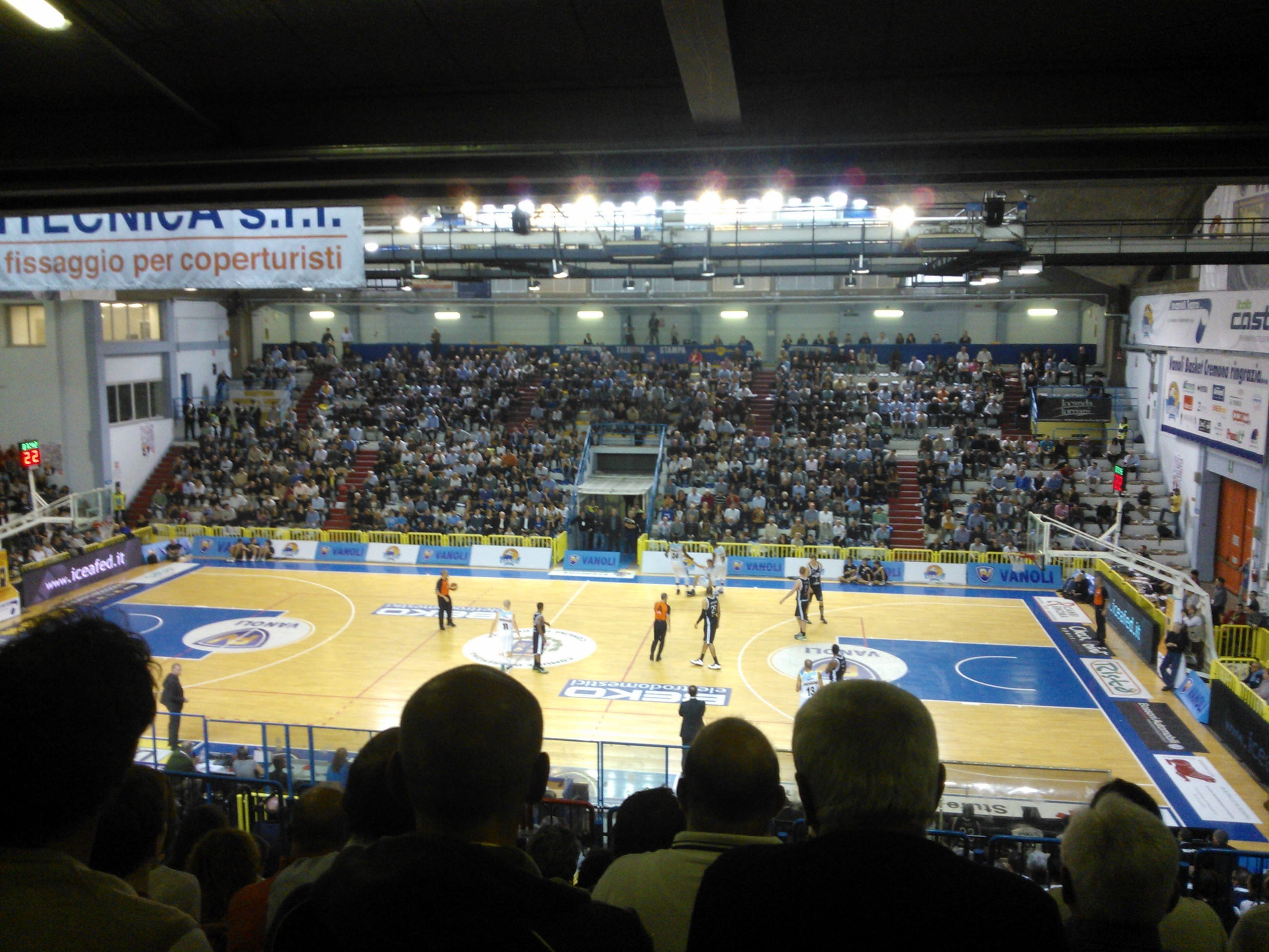 Interno del Palasport Mario Radi di Cremona durante la partita di Serie A FIP Vanoli Cremona - Granarolo Bologna